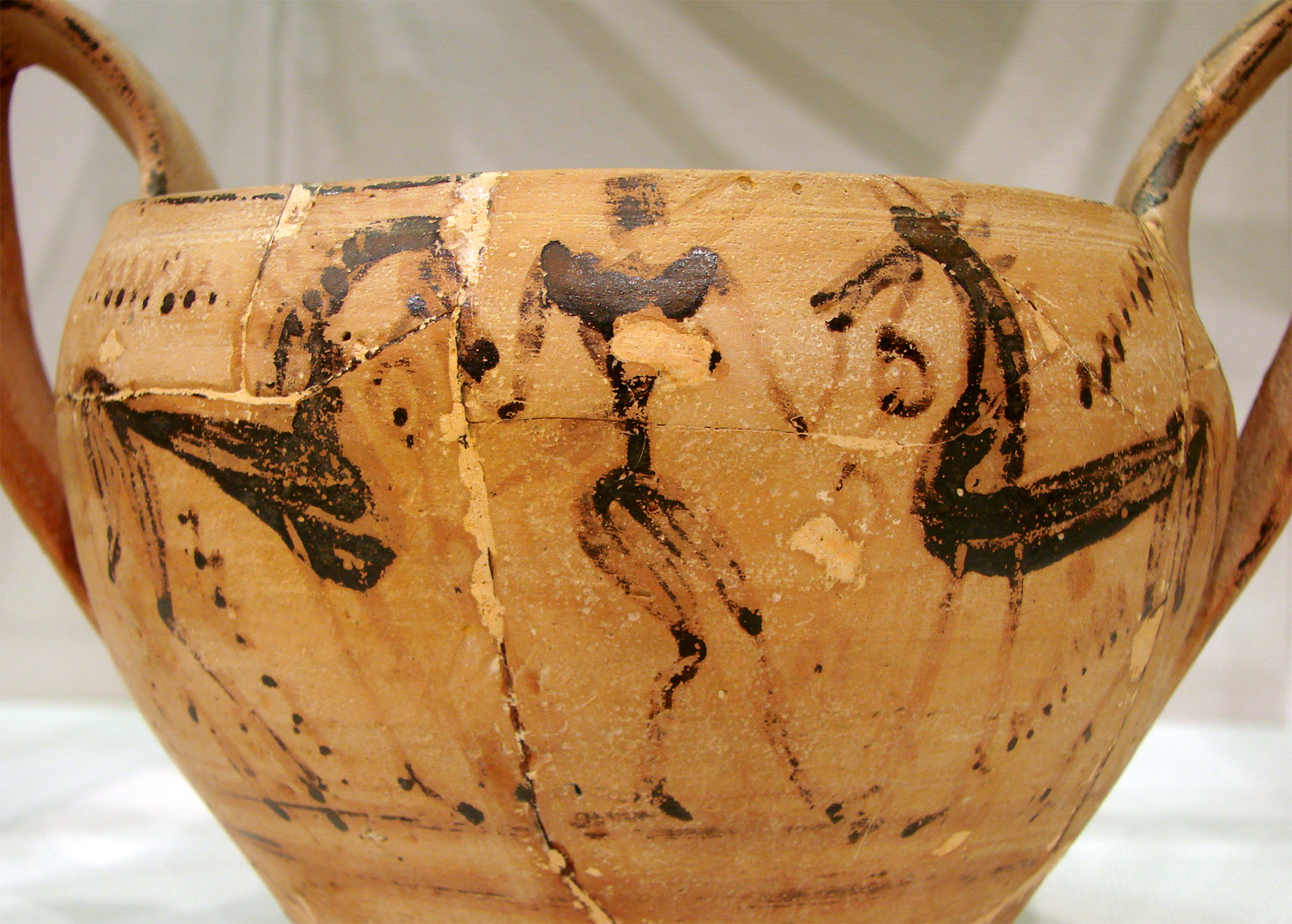 Canthare. Décor: un homme tenant deux chevaux, par "le maître des chevaux". Attique, période géométrique (730-700 - JC). Musée de Laon.